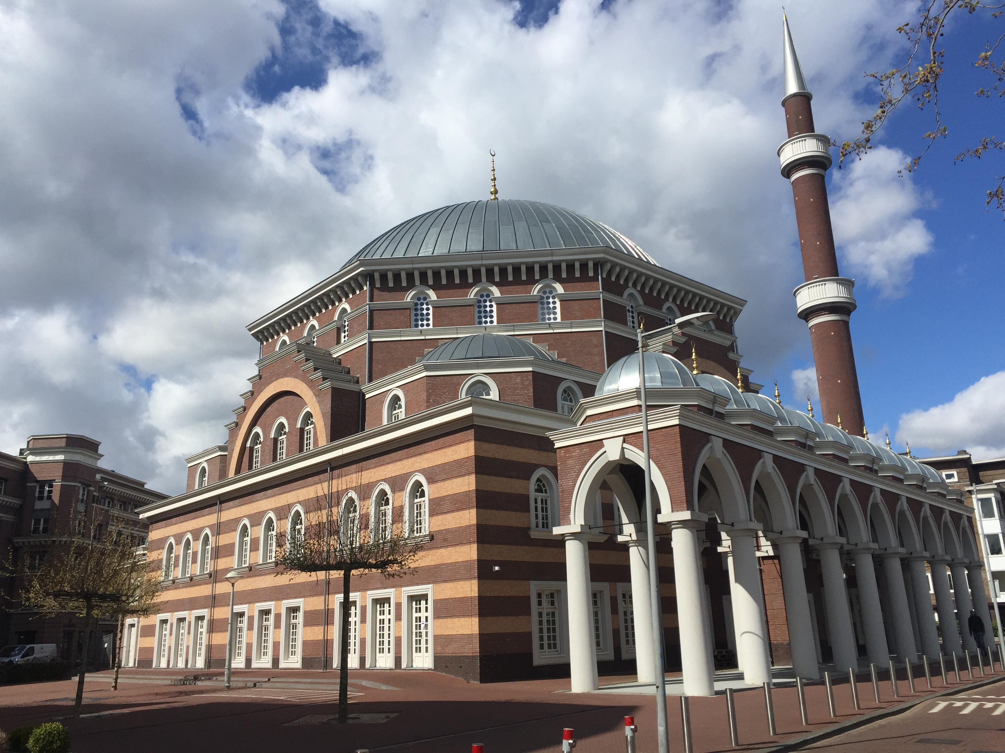 Westermoskee Aya Sofya (Amsterdam, The Netherlands 2017)